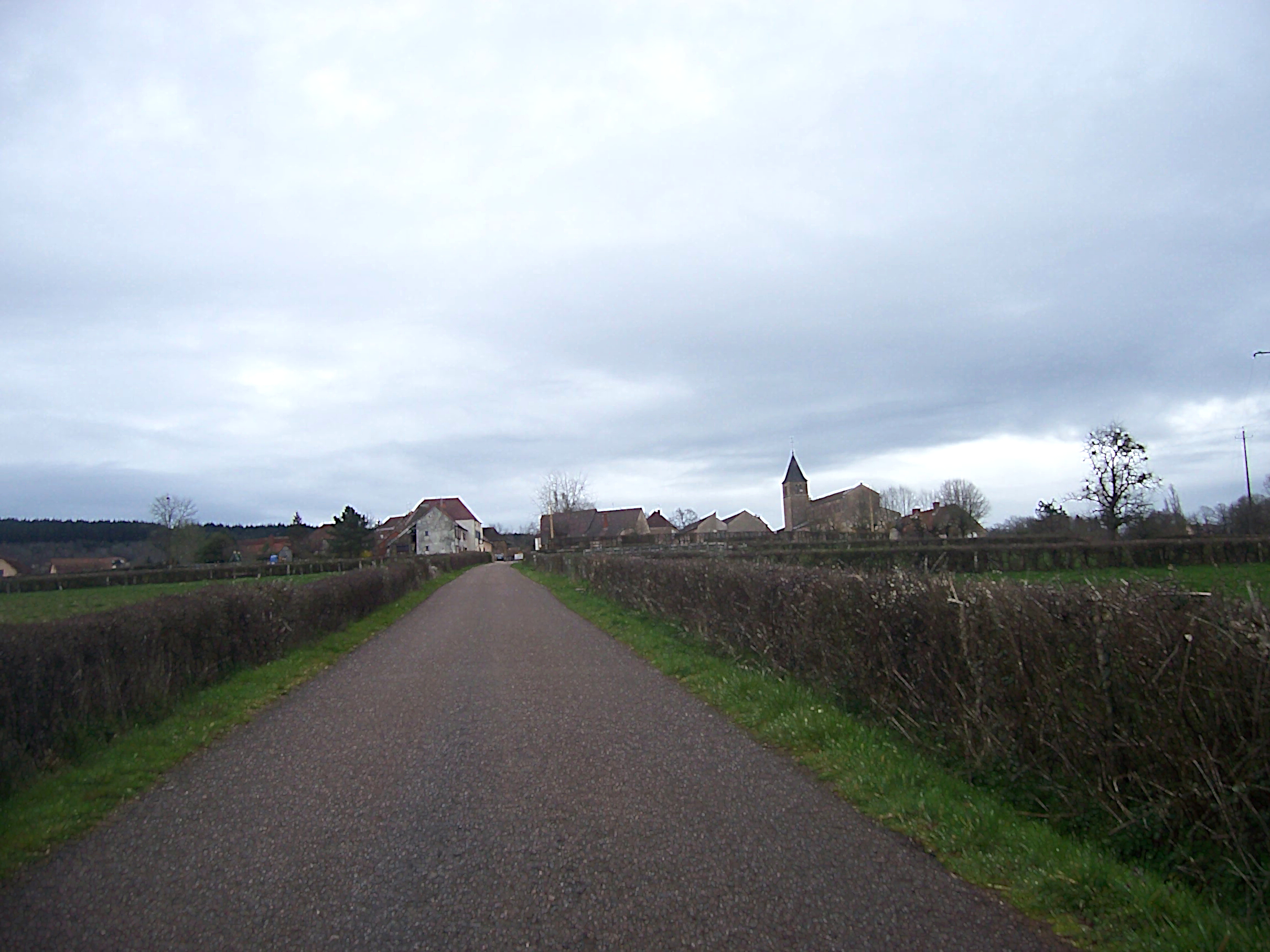 Colombier-en-Brionnais